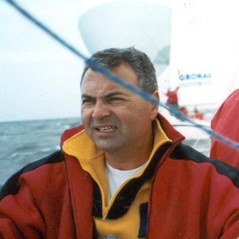 Konstantinos Alexandropoulos, Travemunde 2000